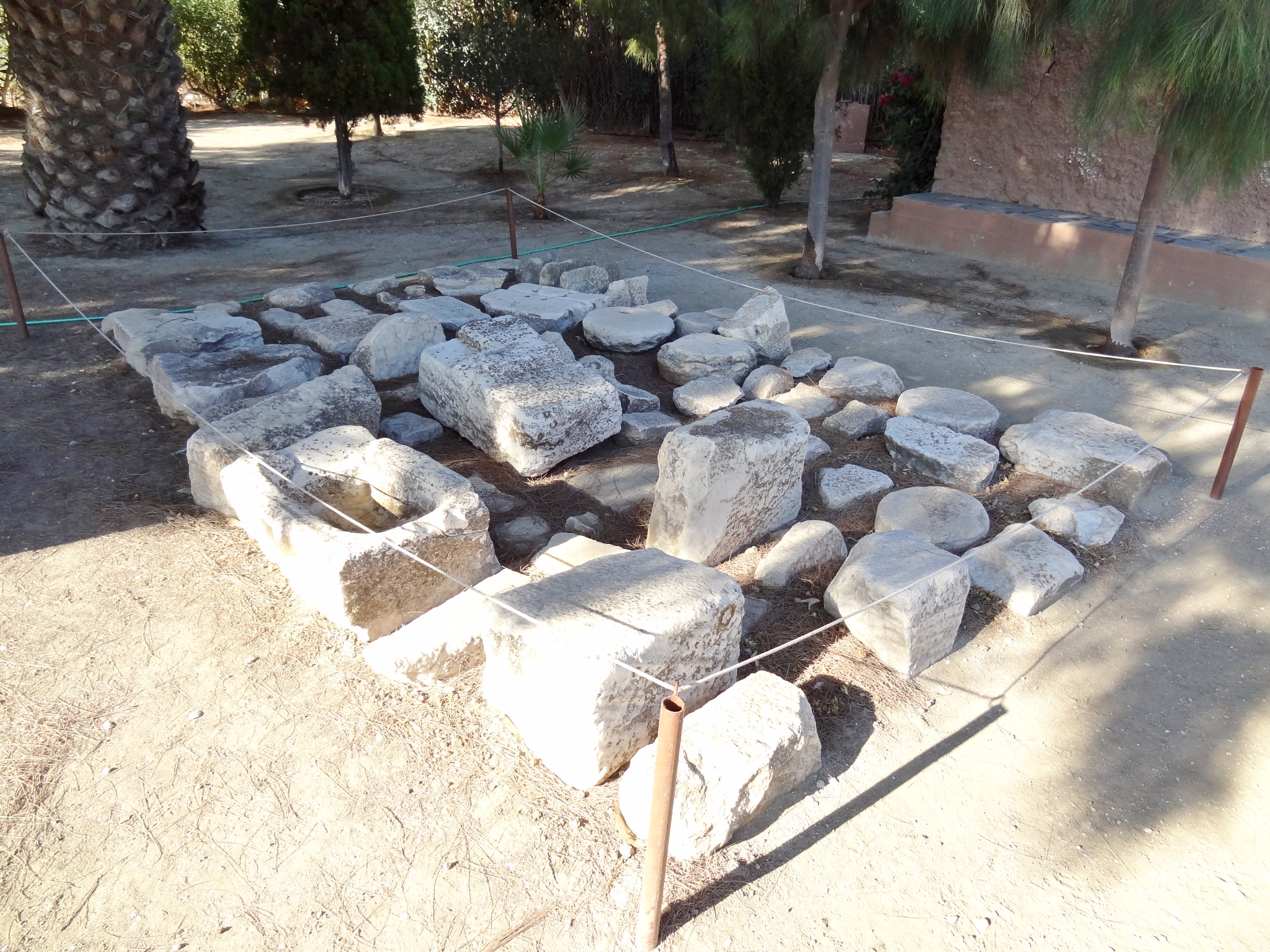 Baureste des Tempels des Dionysos von Yria auf Naxos, Kykladen, Griechenland